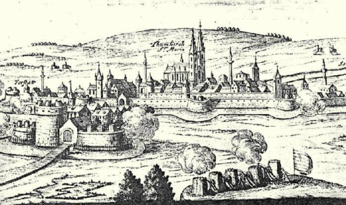 Székesfehérvár visszafoglalása 1601-ben